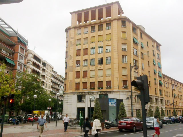 Estación de autobuses de Logroño